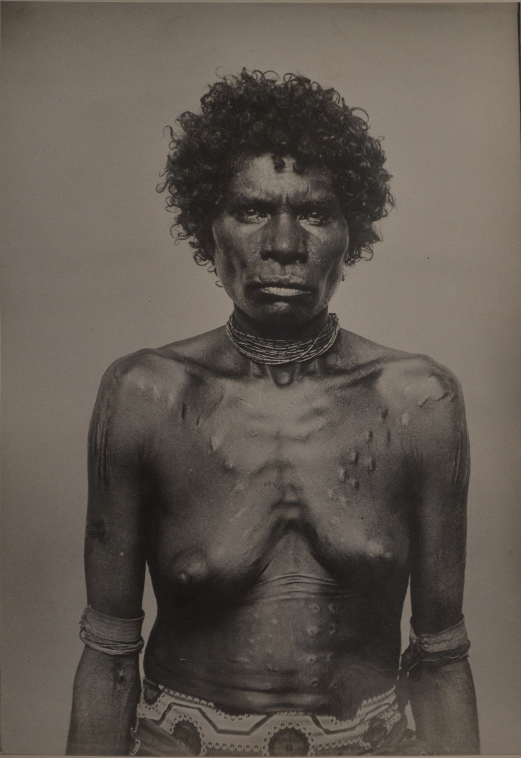 Portrait photographique par Paul Heinrich Matthias Foelsche d'une femme anonyme de 40 ans prise entre 1877 et 1893 à Port Darwin ou à Port Essington dans le Territoire du Nord (Australie).